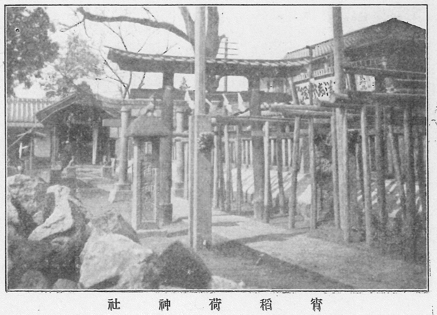 館林宵稲荷神社の古写真 多くの寄進鳥居が並んでいる